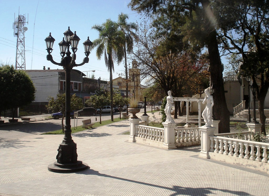 Plaza Bartolomé Mitre en Simoca, Tucumán. Al fondo la Parroquia Nuestra Señora de las Mercedes.